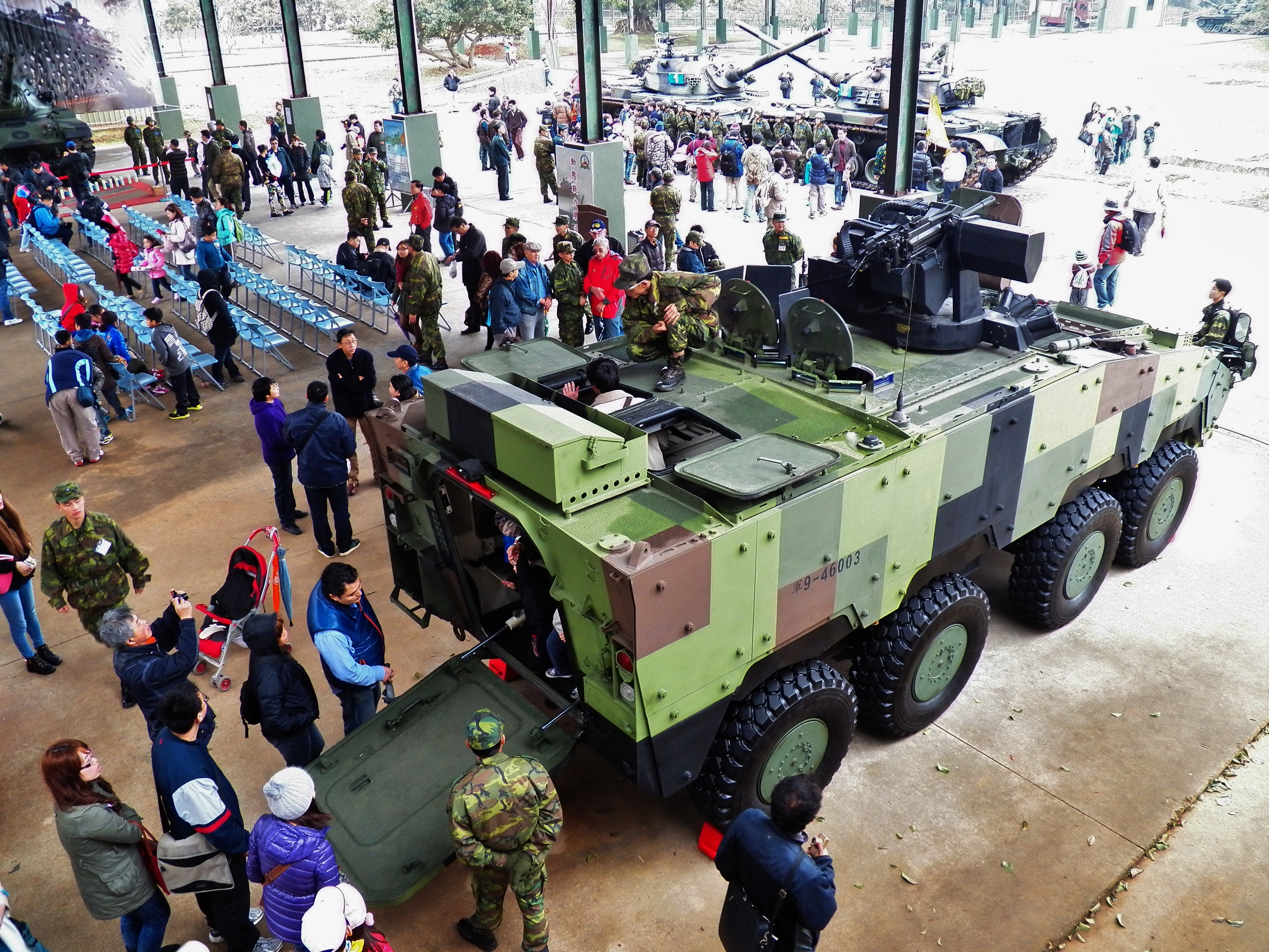 性能示範結束，戰車乘員下車一字排開與民眾合影，雲豹甲車上的士兵與車內參觀者交談。